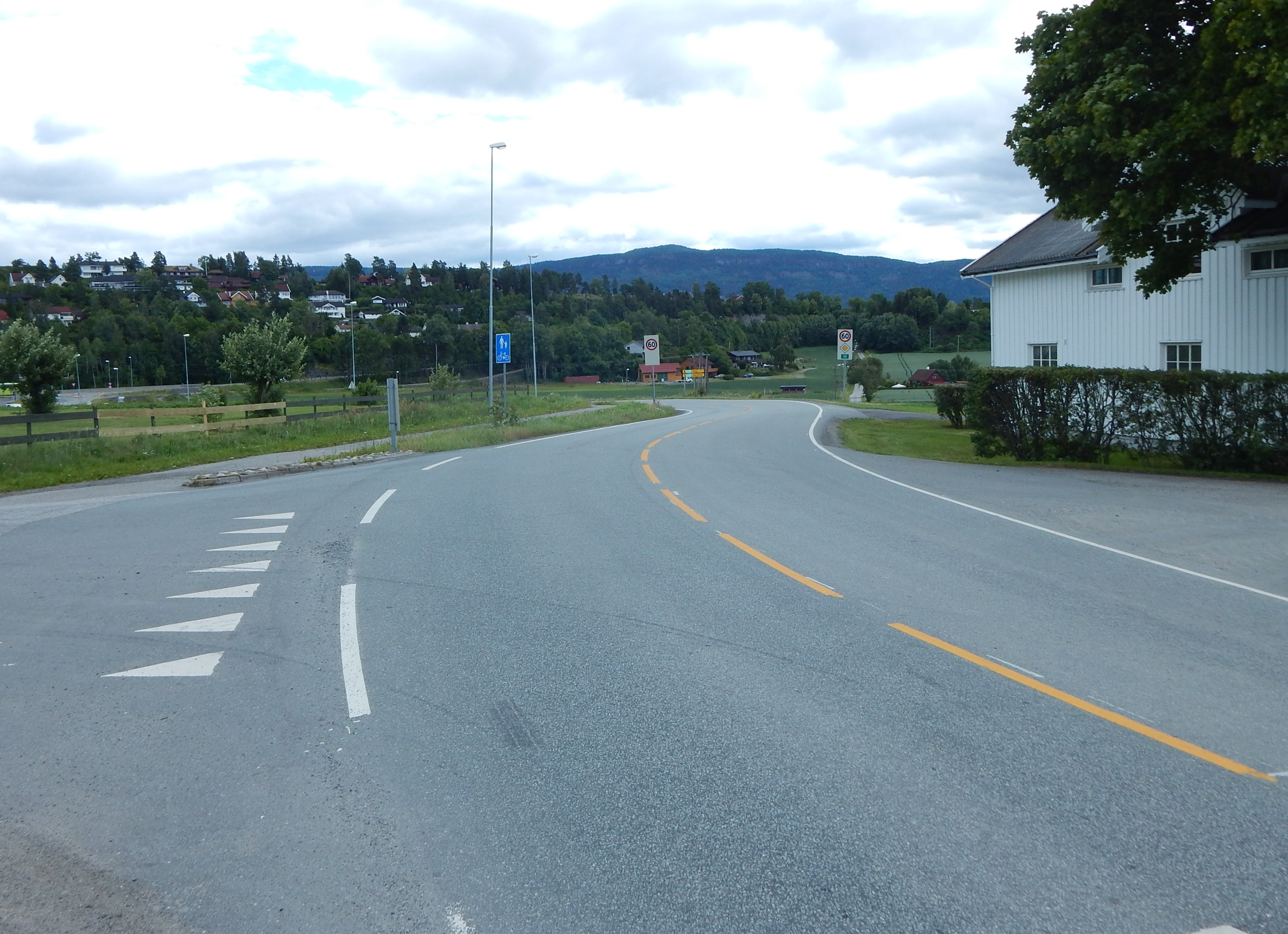 Norderhovveien (fylkesvei 158) østover nær Norderhov kirke